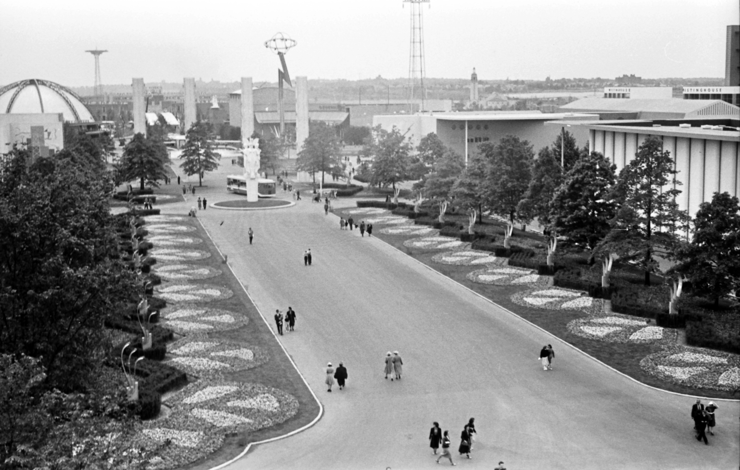 "A holnap világa" világkiállítás, 1939. Location: USA, New York Tags: international fair Title: \